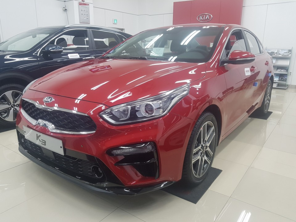 기아 K3(2세대) 정측면